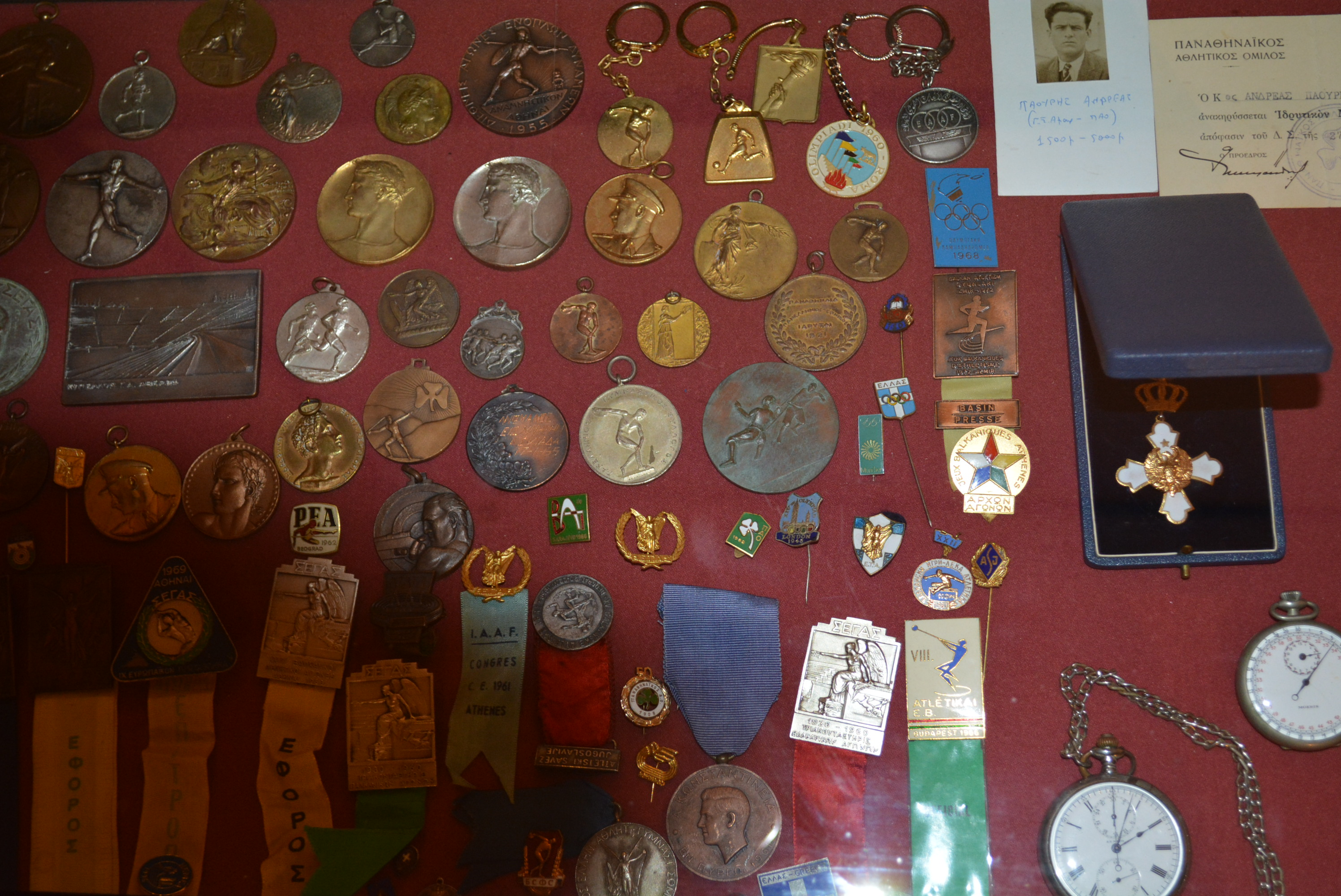 Μετάλλια και βραβεία